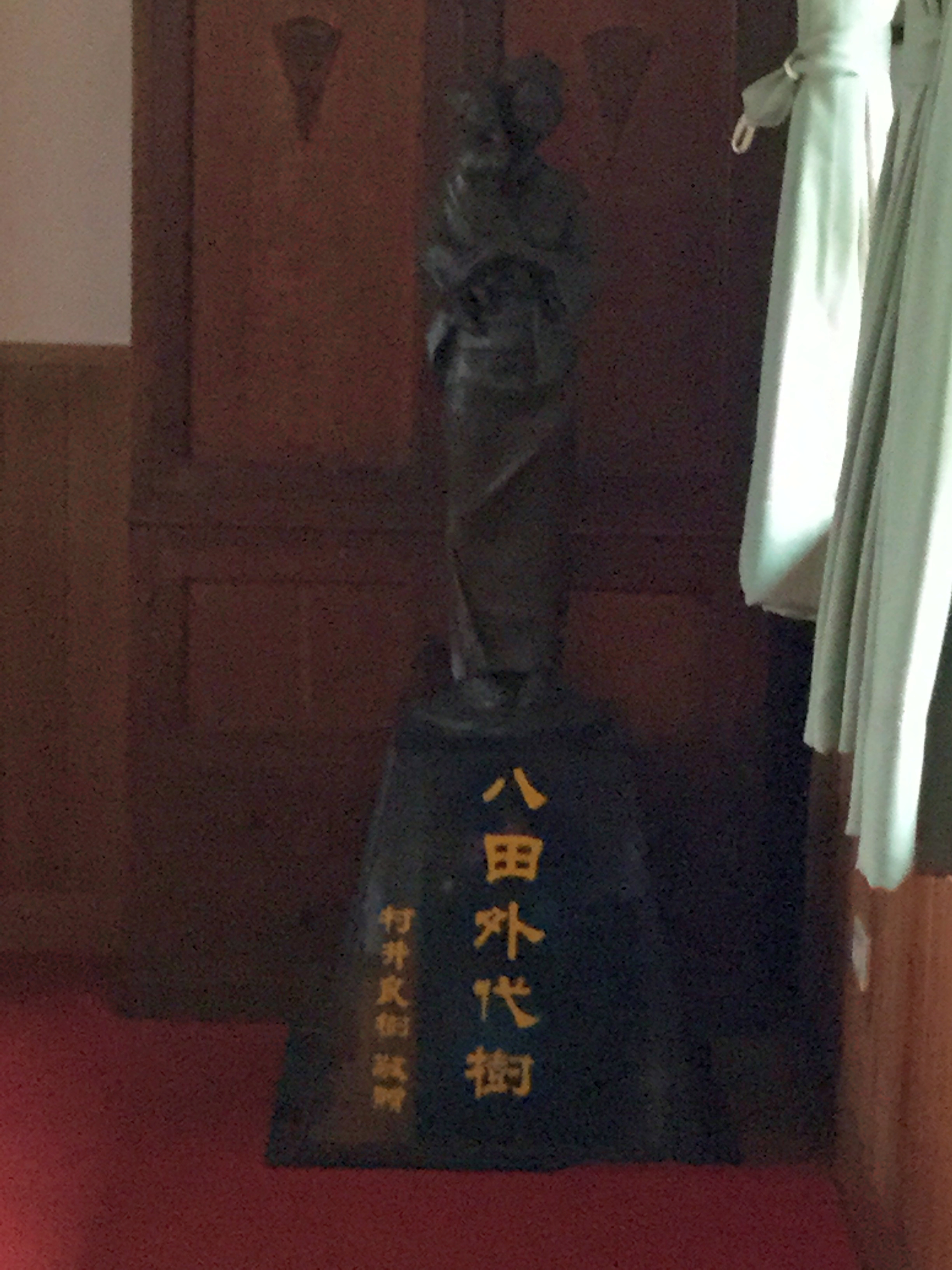 八田與一故居的八田外代樹像